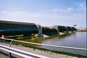 Eidersperrwerk von der Landseite aus betrachtet